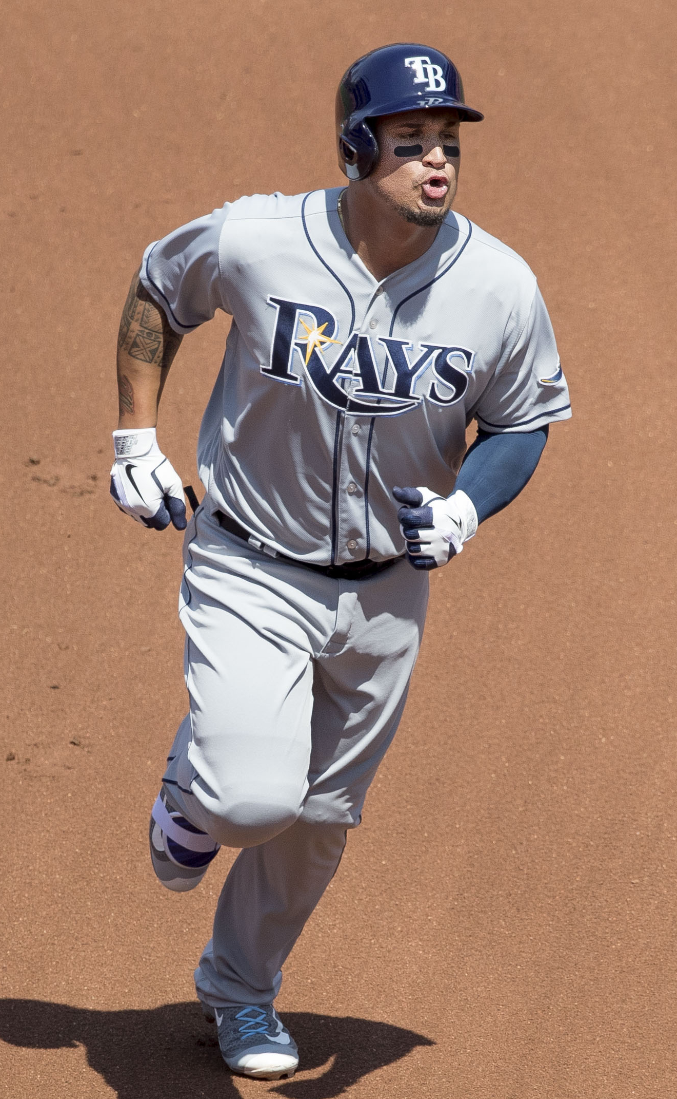 Oswaldo Arcia